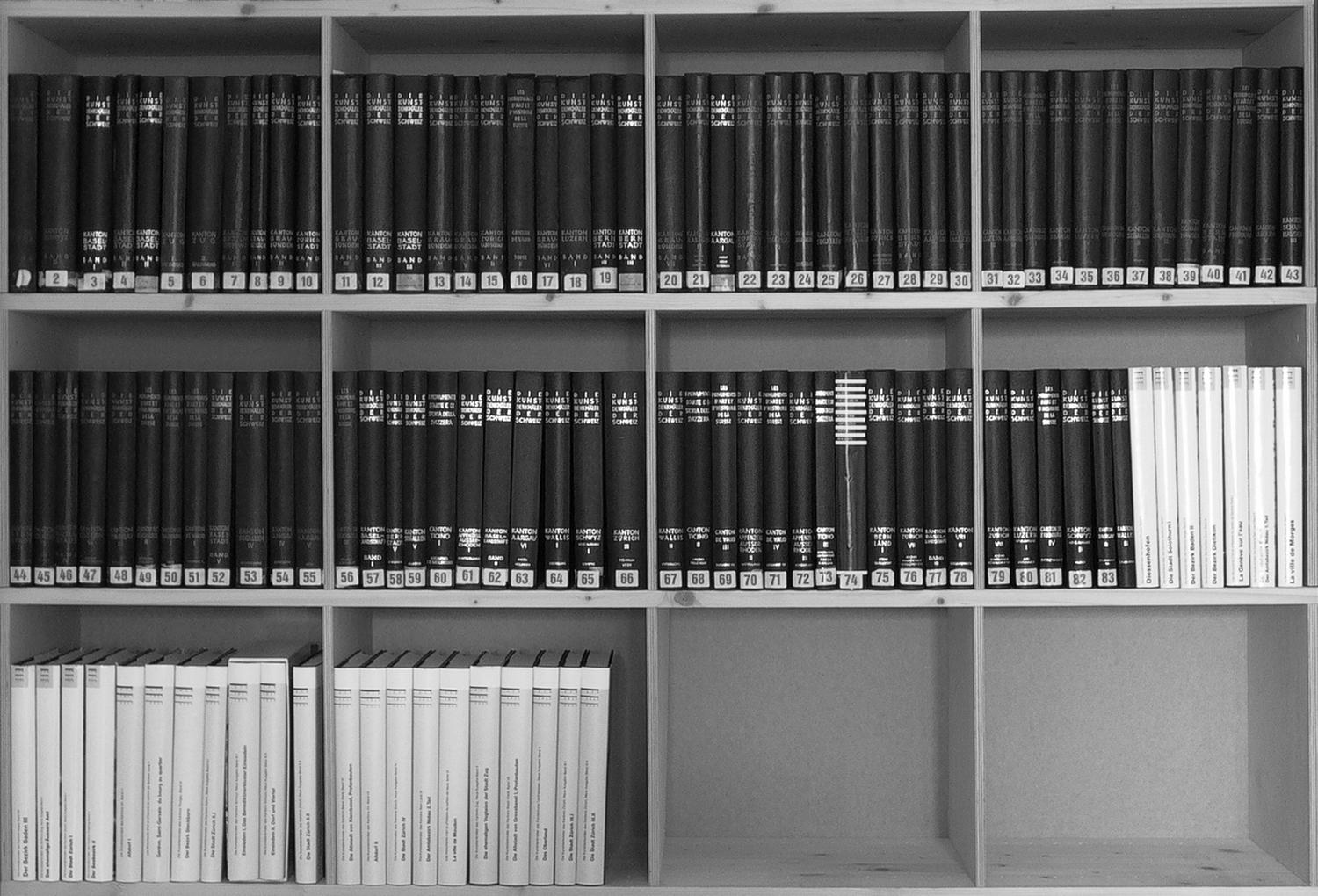 Alle bereits erschienenen Bände der Buchreihe Die Kunstdenkmäler der Schweiz KdS